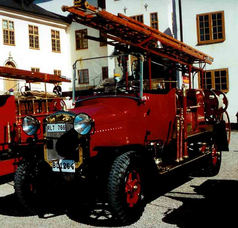 Hansa-Lloyd Fire Engine 1923